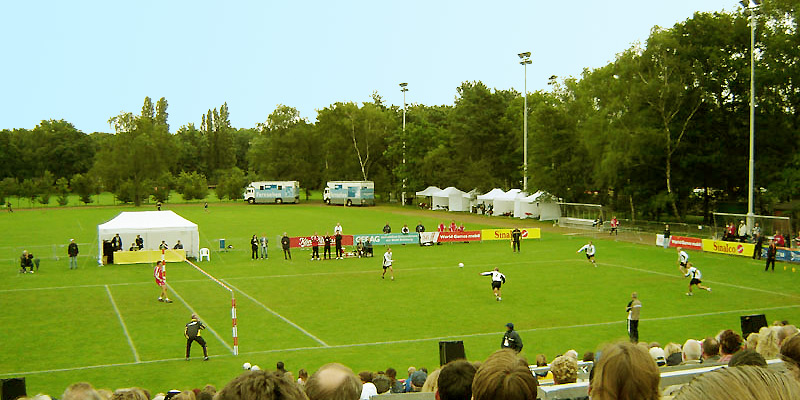 Faustballspiel Deutschland-Schweiz, World Games 2005 Duisburg, Vorrunde